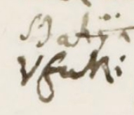 Ausschnitt aus Folio 66r des Manuskriptes Turc 292. Hier findet sich Ali Ufkis Namensform Vfuki, seine eigene Umschrift aus dem Osmanischen